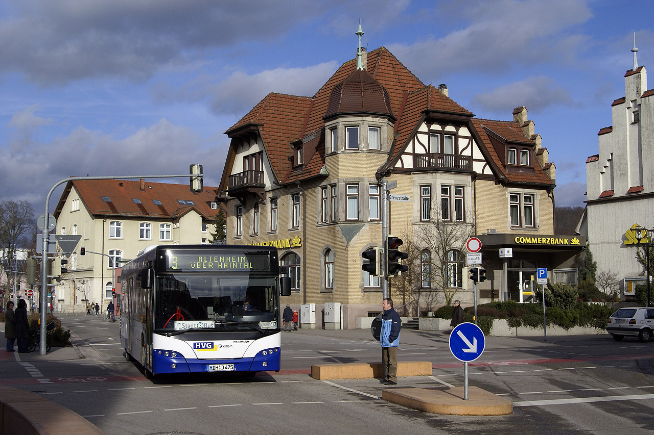 Stadtbus auf der Linie 3 nach Verlassen der Zentralen Omnibushaltestelle.